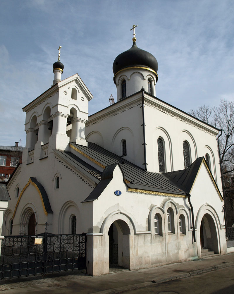 Old believers' Protection of Our lady Church in Ostozhenka (Turchaninov Lane, 4), Moscow. 1907-1911, architects: Adamovich and Mayat.Староообрядческий храм Покрова Пресвятой Богородицы на Остоженке. Москва, Турчанинов переулок, 4. Арх. Адамович и Маят, 1907-1911